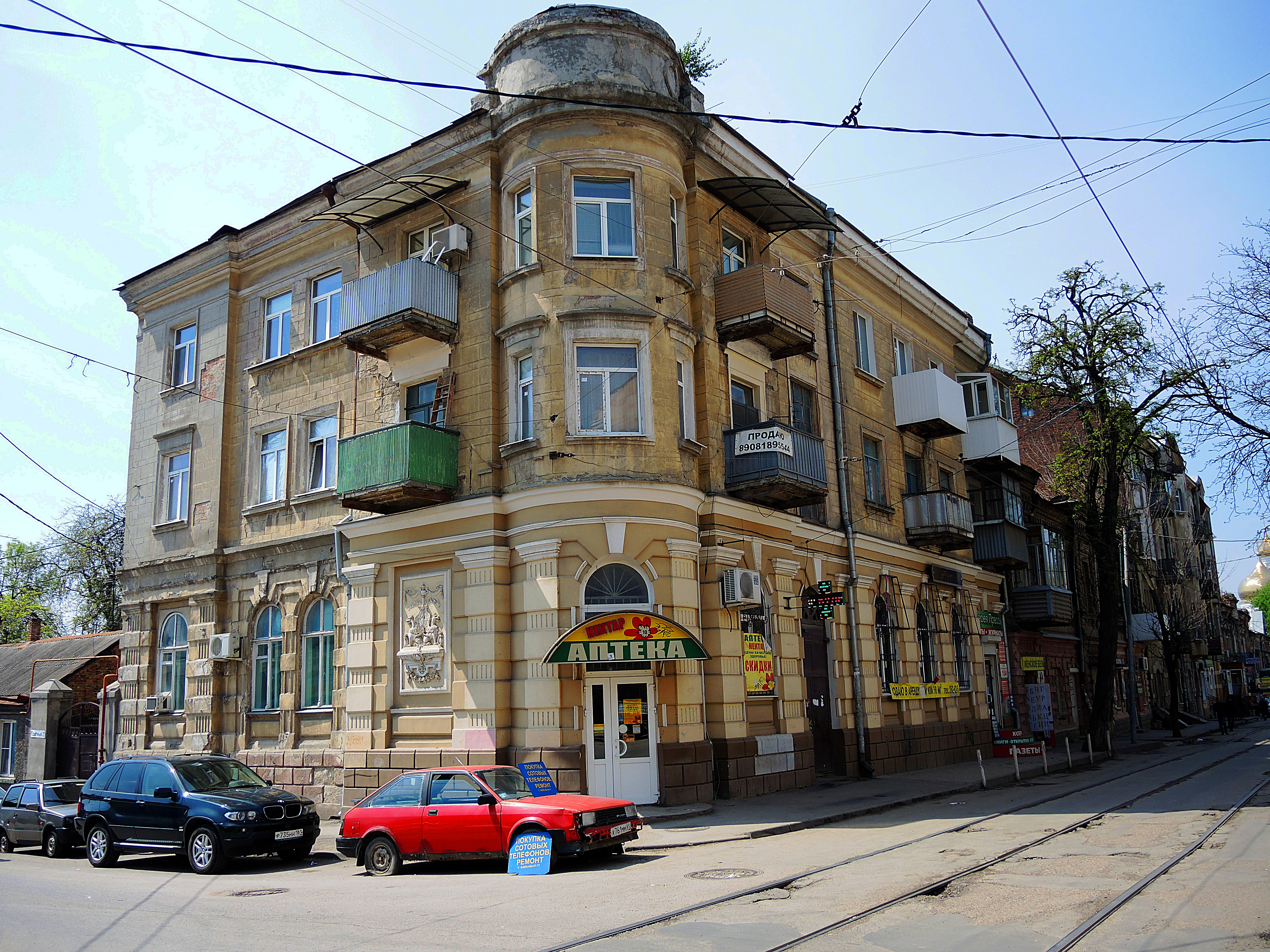 Доходный дом Л.Ф. Волкенштейн: улица Станиславского, 104/25, переулок Газетный, литер А, Ростов-на-Дону, Ростовская область